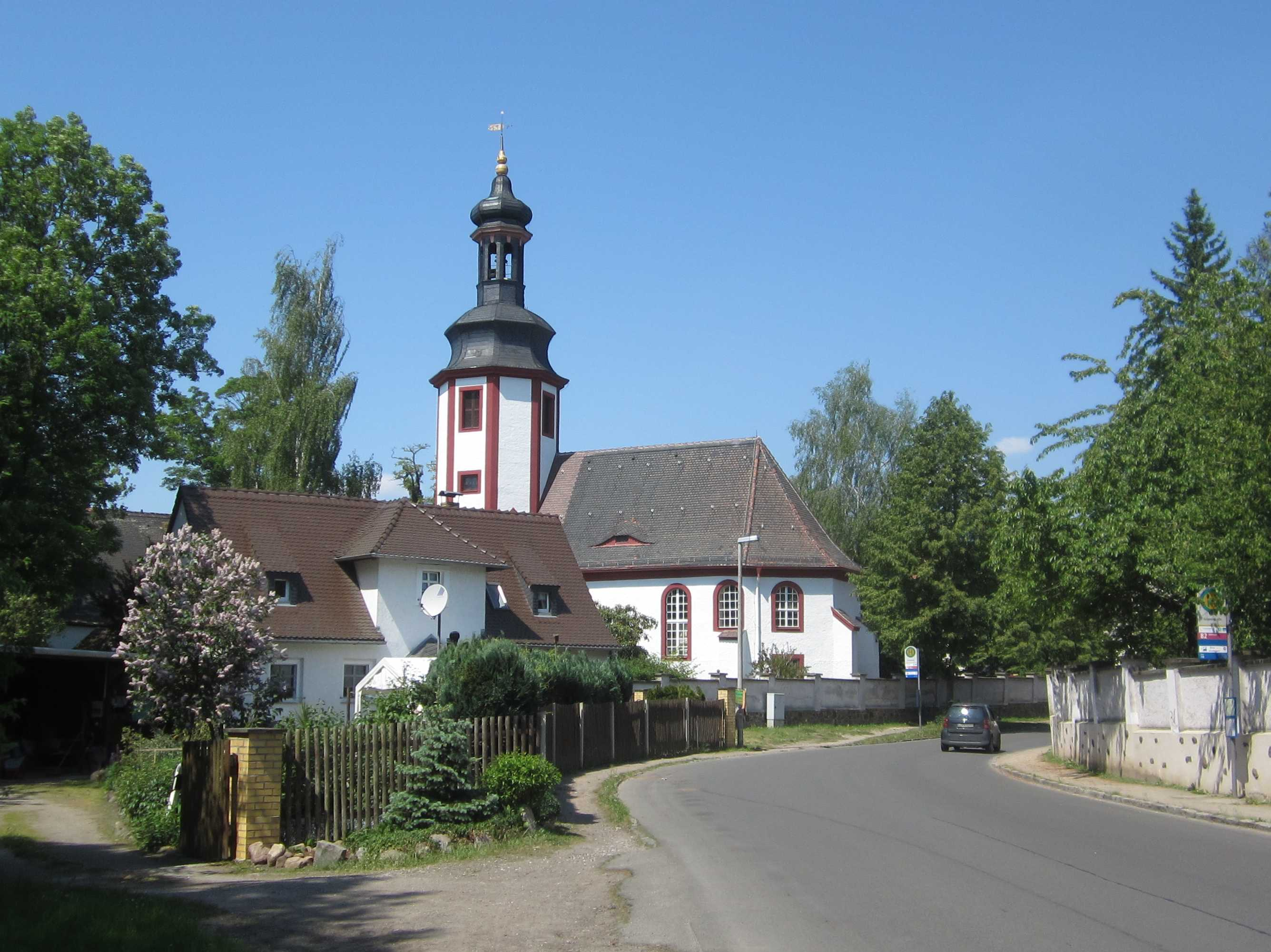 Kirche von Plaußig, Grundstraße 17, Blick von der Grundstraße, Leipzig